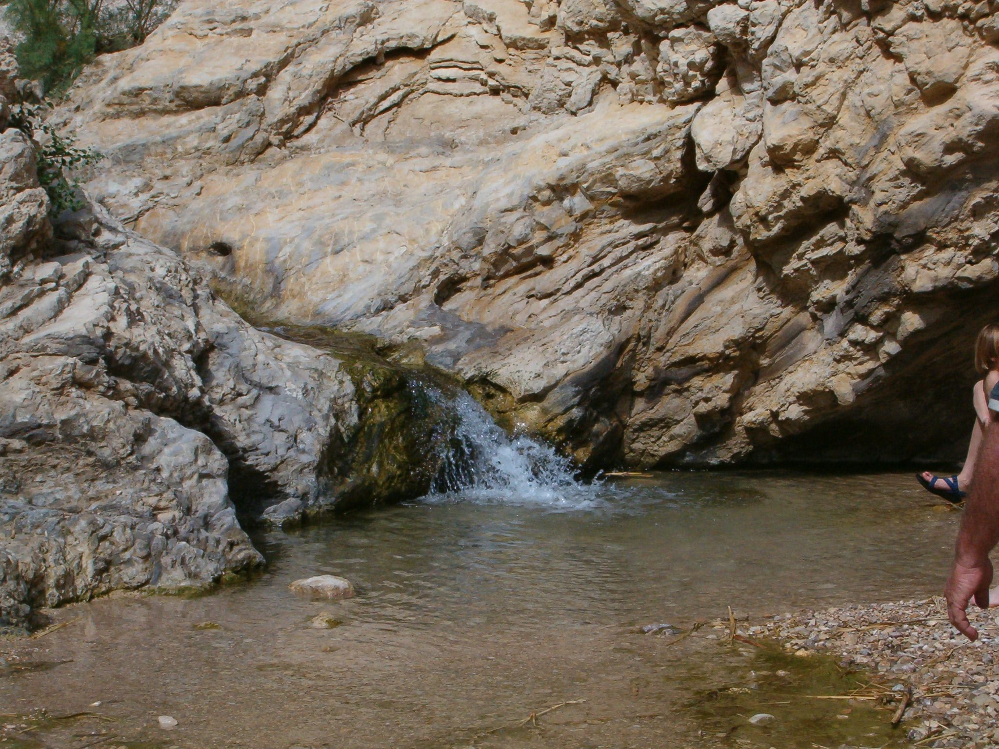 עין בוקק, 2005. צילם י.ש. 09:07, 13 ינואר 2006 (UTC)